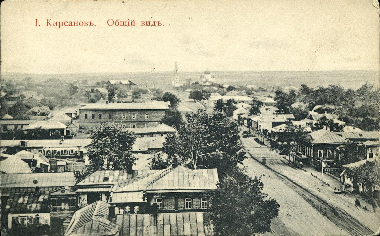 Вид на Тихвино-Богородицкий монастырь с колокольни Успенского собора